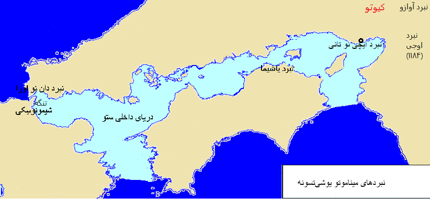 محل رخداد دان نو اورا در تنگه شیمونوسِکی